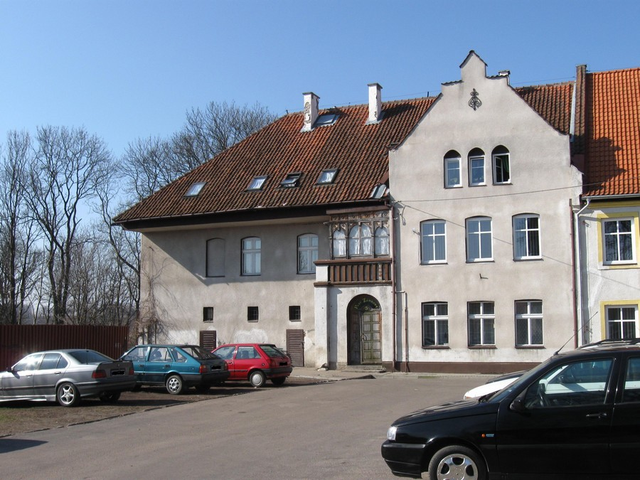 zamek